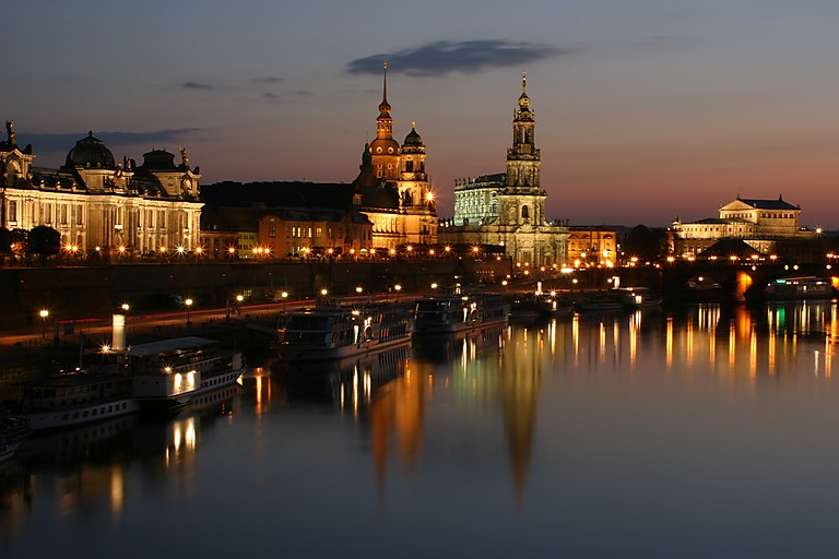 Panorama der Dresdner Altstadt.